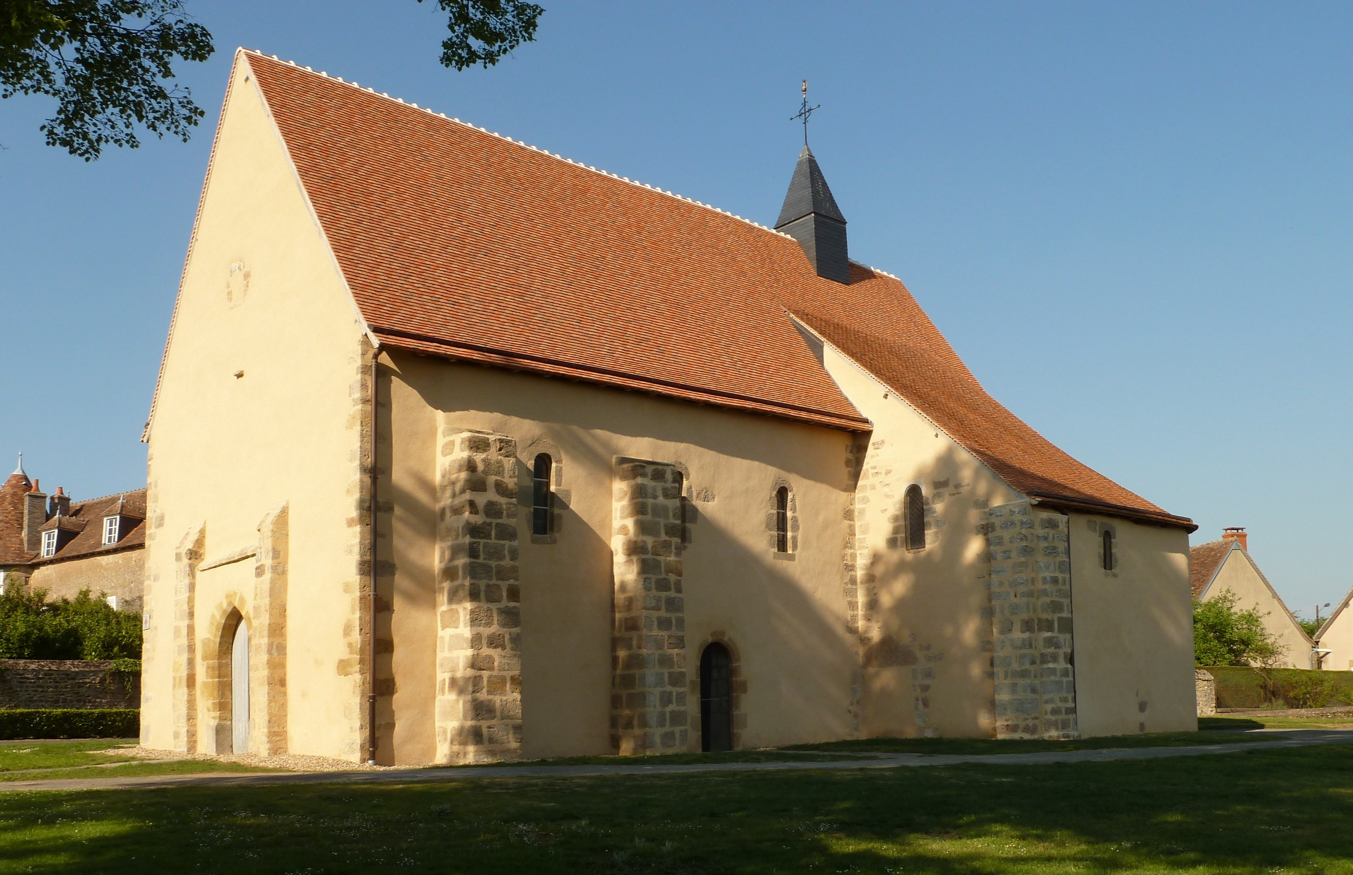 St Pierre .